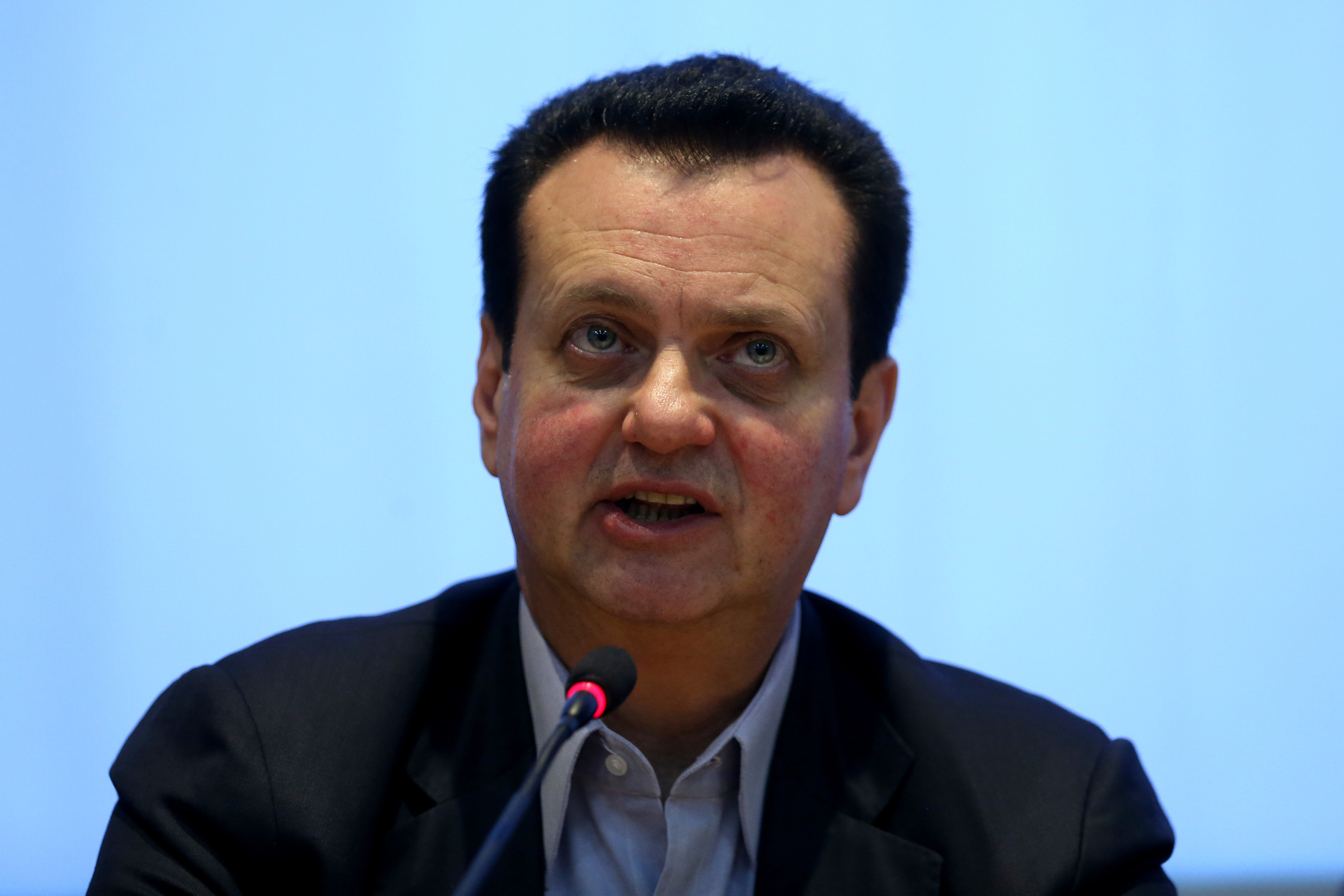 Brasília - O ministro da Ciência e Tecnologia, Gilberto Kassab lança a 14ª Semana Nacional de Ciência e Tecnologia (SNCT 2017), com o tema: A matemática está em tudo (Wilson Dias/Agência Brasil)